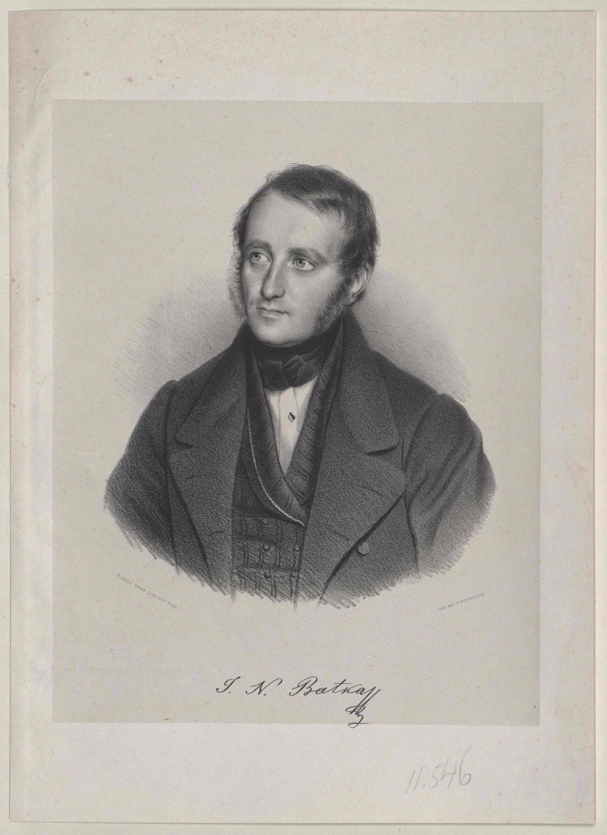 Komponist und Musiker